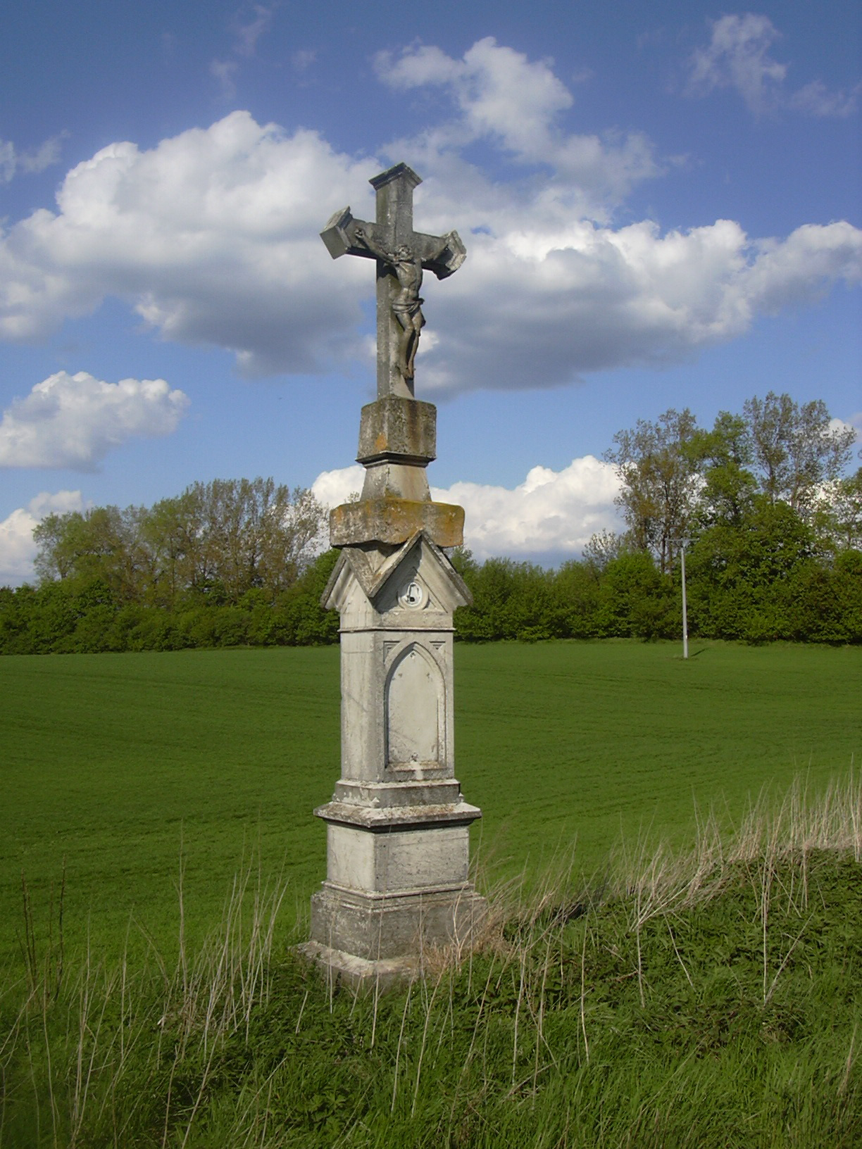 Kamenný kříž směr Kučerov v Lysovicích (Vyškov District - Czech Republic)